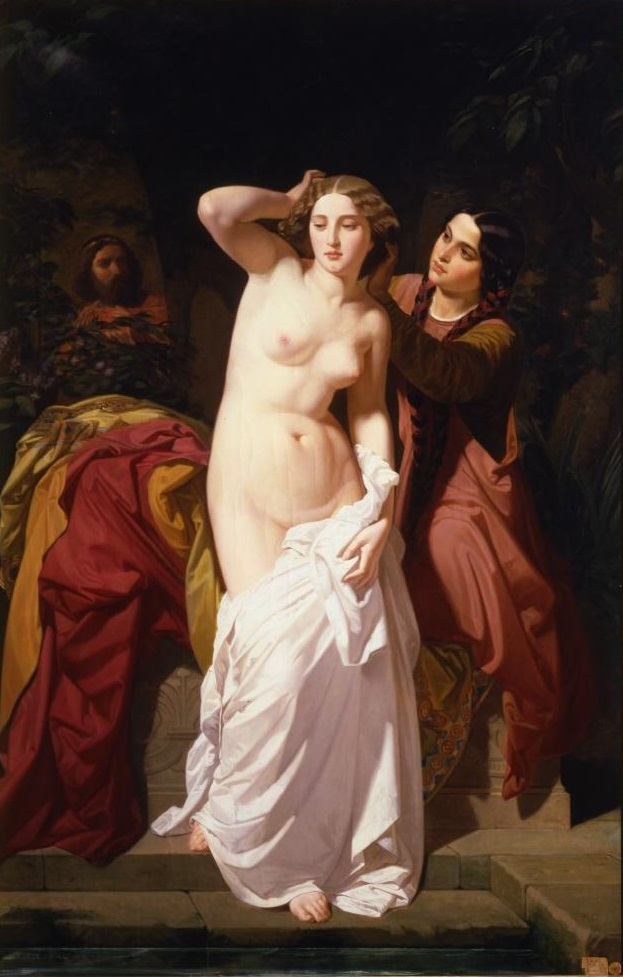 La obra representa a la legendaria Florinda la Cava desnuda y saliendo del baño.